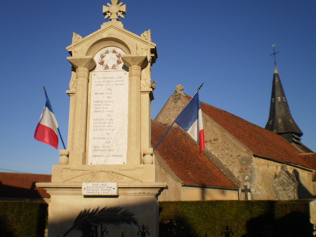 Iglesia de Fain Le moutiers